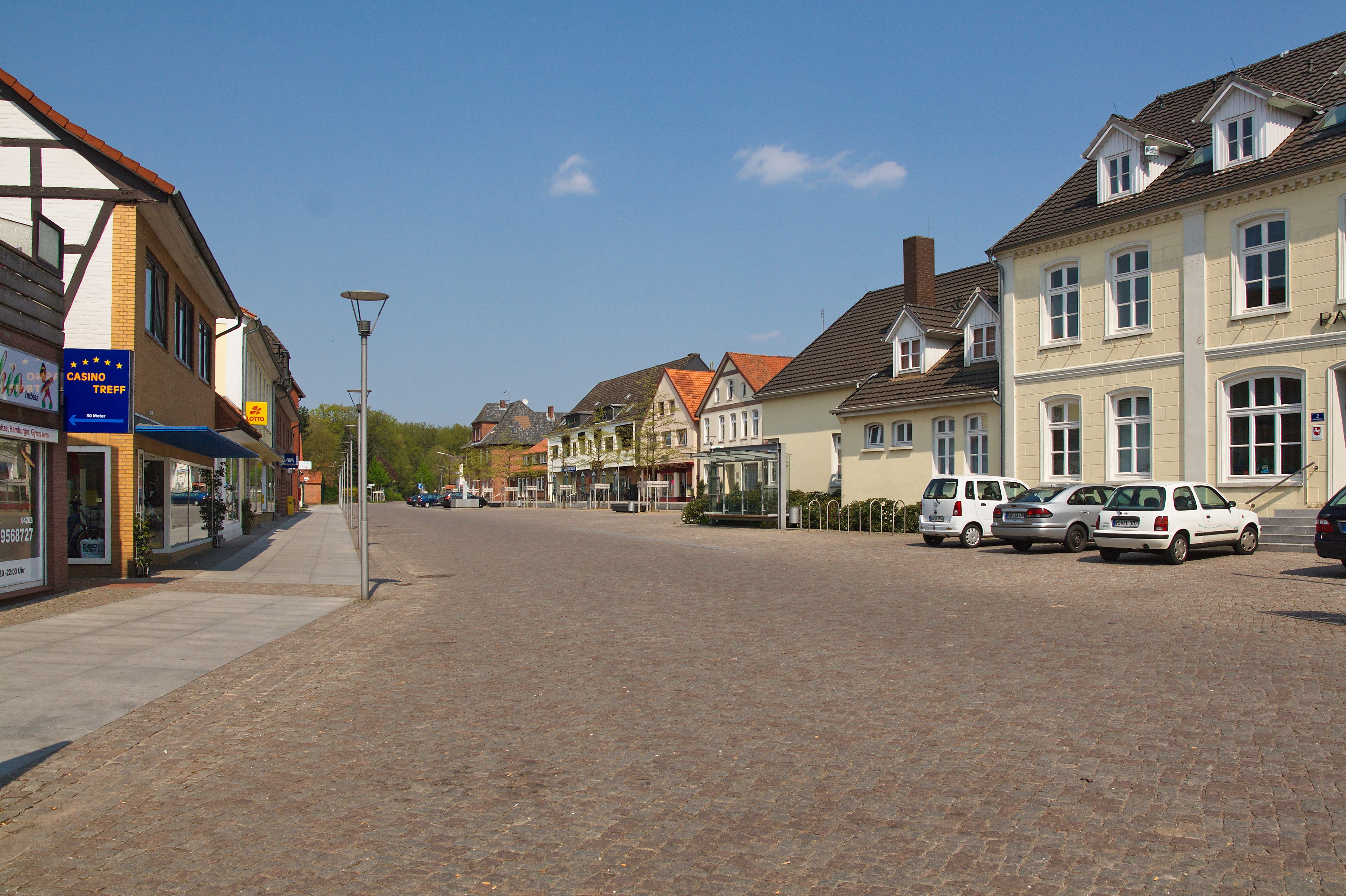 Marktplatz und Rathaus in Visselhövede, Niedersachsen, Deutschland